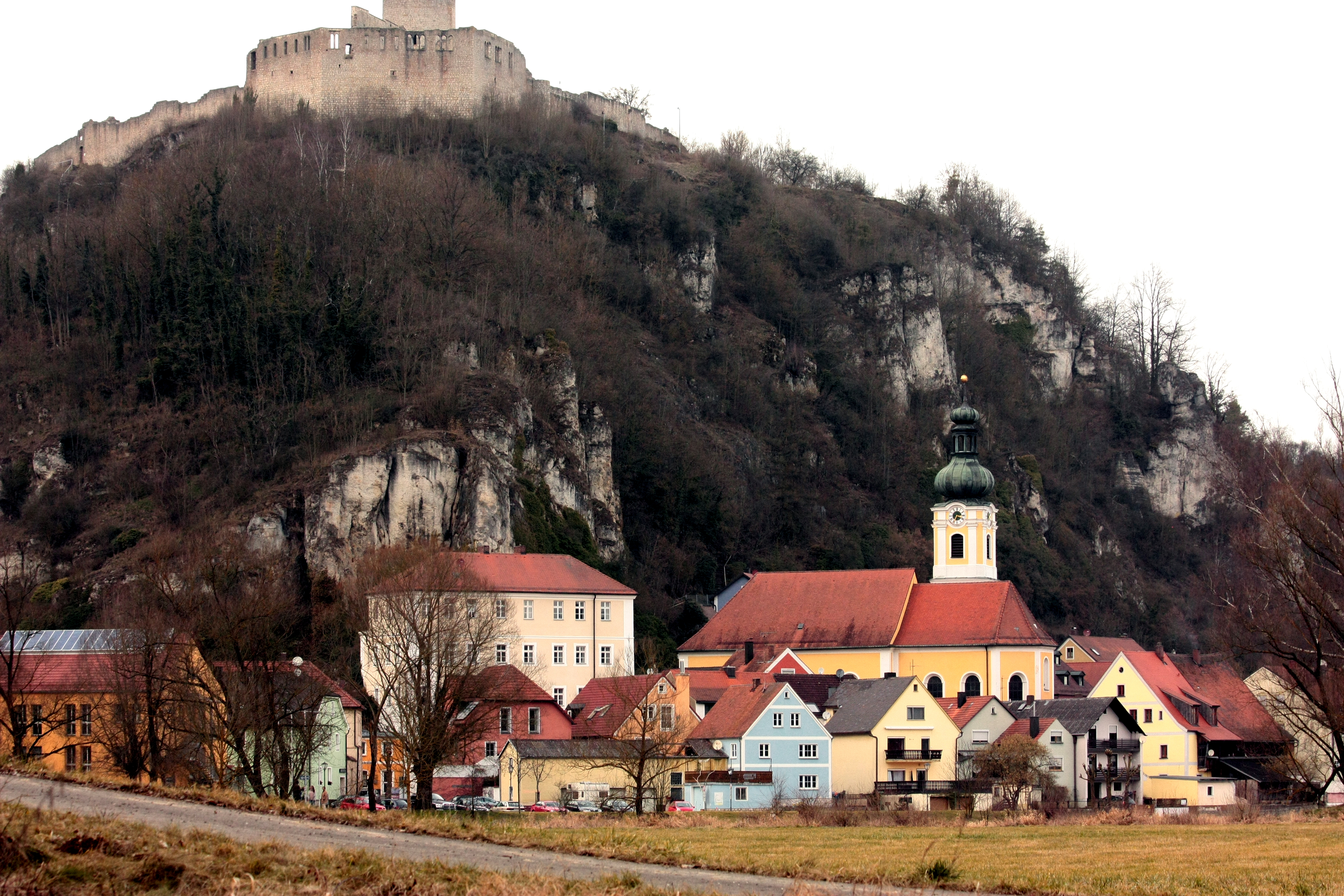 Geotop Landkreis Regensburg Schlossberg von Kallmünz Objekt-Nr. 375R003